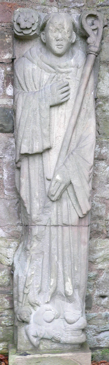 Dundrennan Abbey - effigy of unknown abbot, Scotland